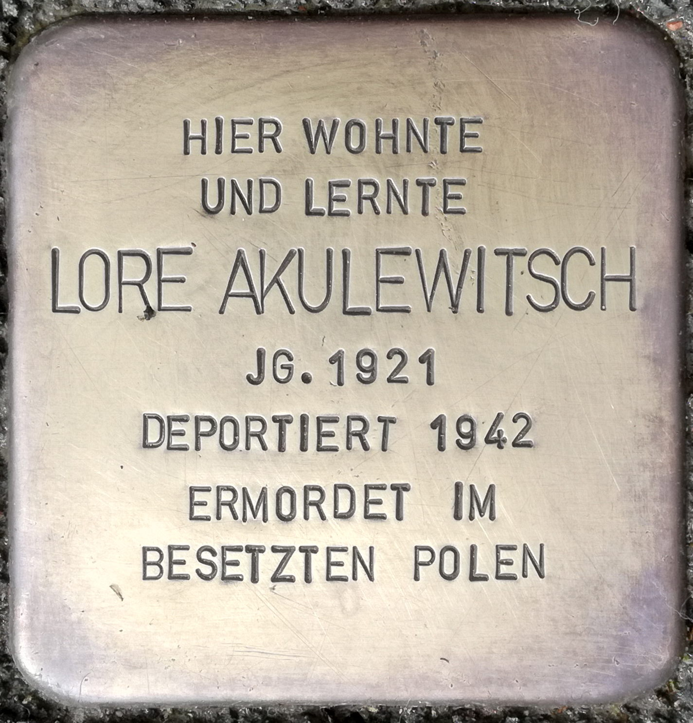 Hier wohnte und lernte Lore Akulewitsch Jahrgang 1921 deportiert 1942 ermordet im besetzten Polen